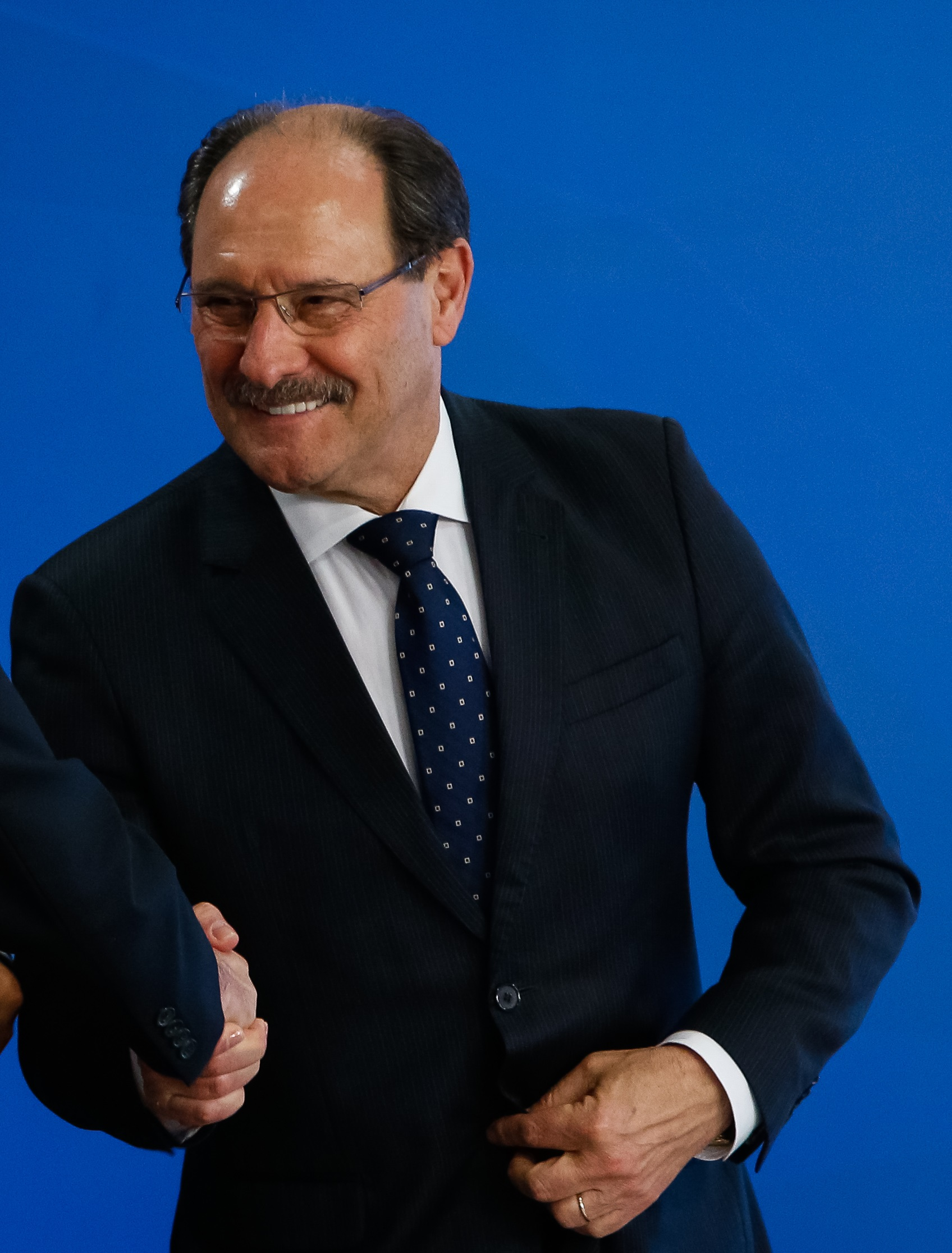 (Brasília - DF, 01/08/2017) Cerimônia de Assinatura de Ato que Autoriza a Criação de Novos Cursos de Medicina. Presidente da República, Michel Temer, cumprimenta o Governador do Rio Grande do Sul, José Ivo Sartori, após o evento.Foto: Alan Santos/PR